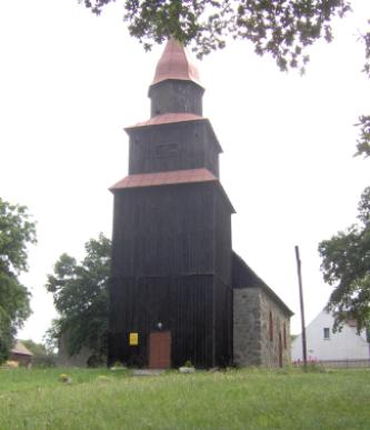 Kościół w Marszewie, pow. goleniowski. Autor: Maks Saczywko (Soczewa)